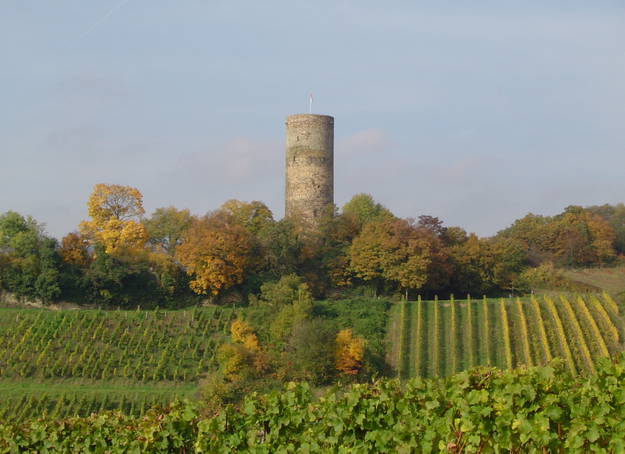 Burg Scharfenstein in Kiedrich (Rheingau, Hessen)